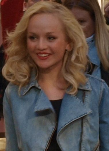 Anna Bergendahl anländer till ett uppträdande i Forum Nacka.